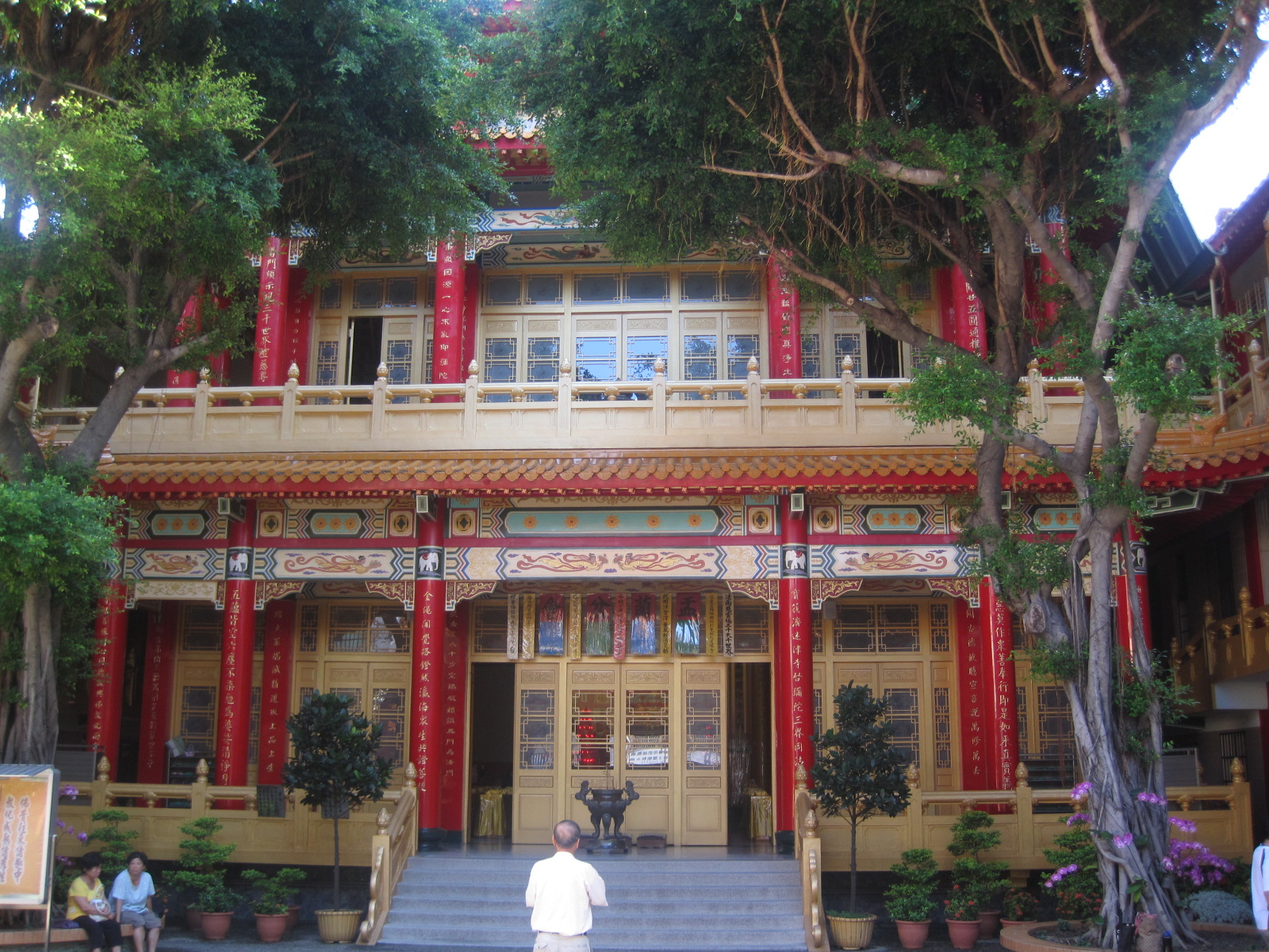 臺南彌陀寺正殿